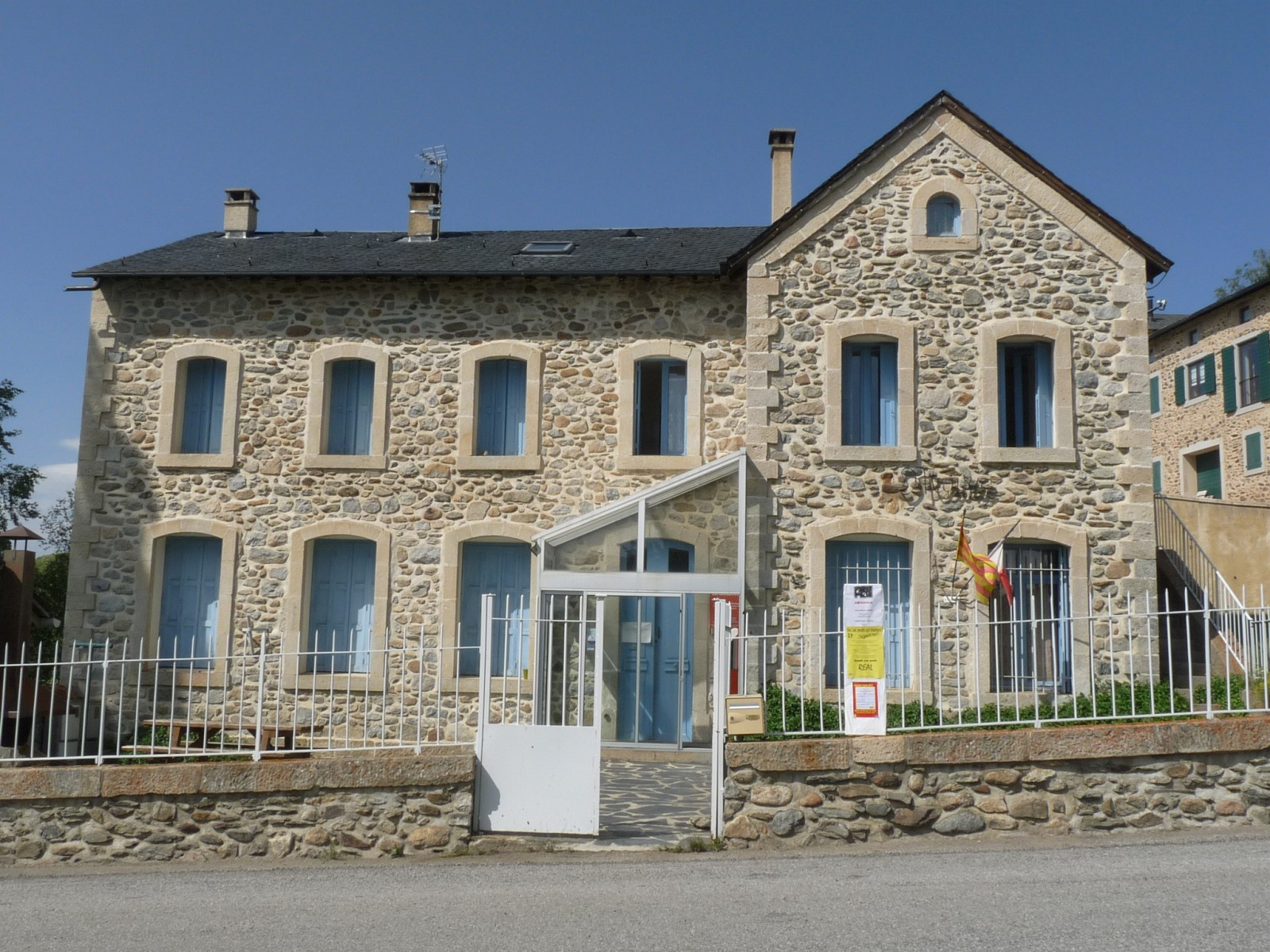 Mairie de Réal, Pyrénées-Orientales, France